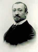 Portrait de Paul Villard (physicien)